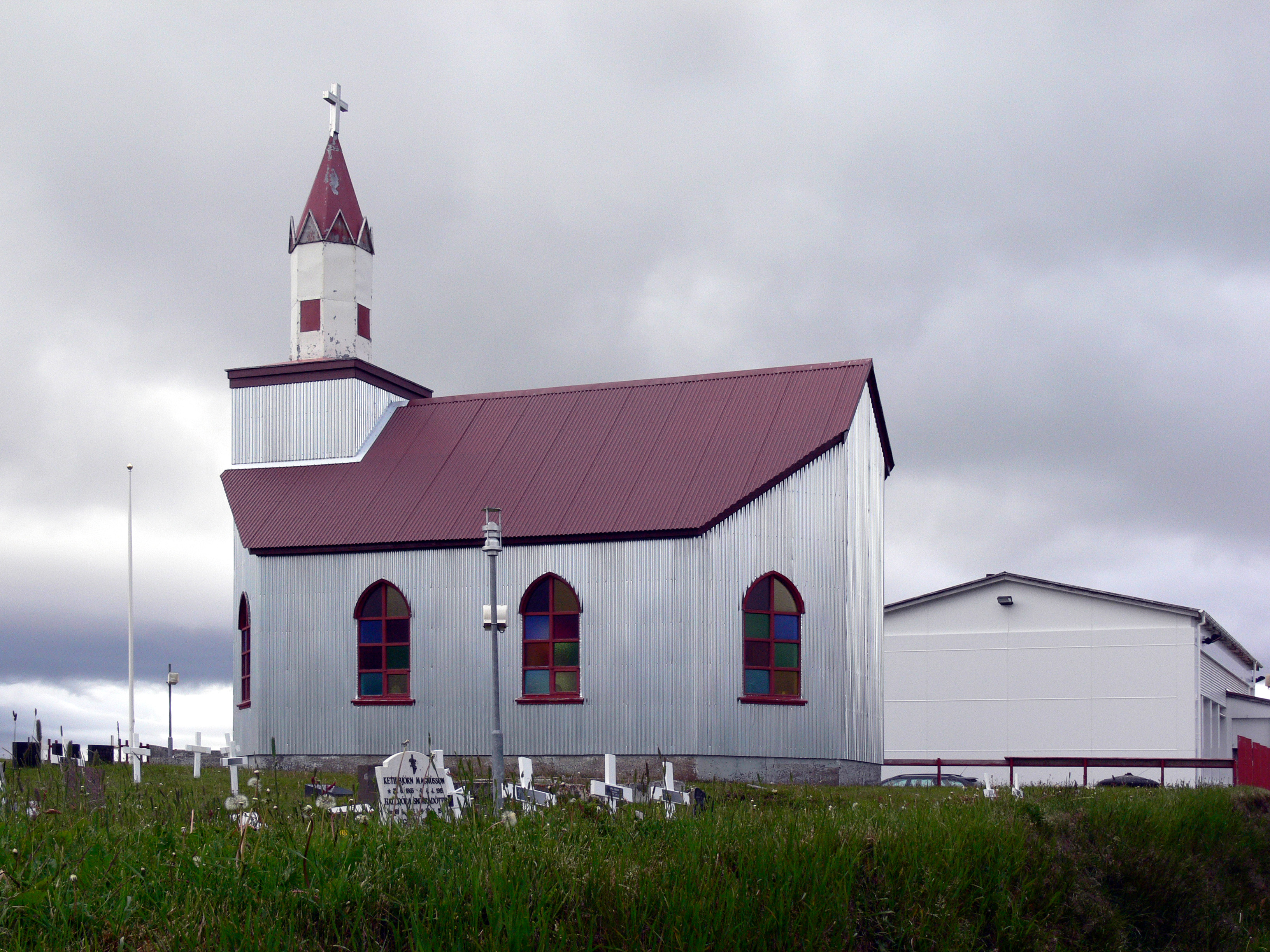 Staðarhólskirkja in Staðarhólsdalur (Saurbær)